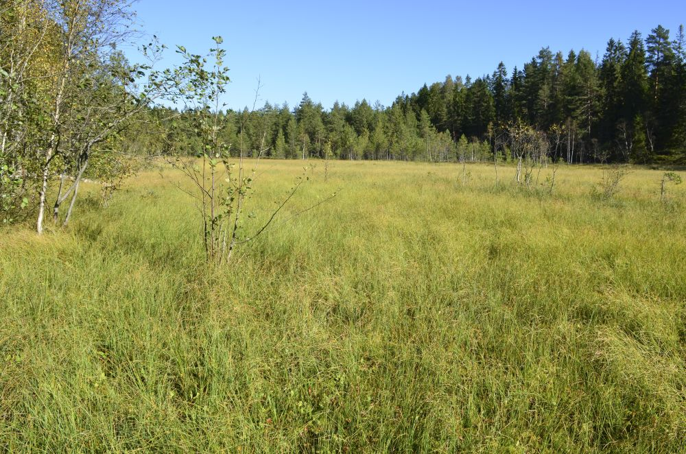 Myra ved Langrud er en av de fineste i Vestfold.